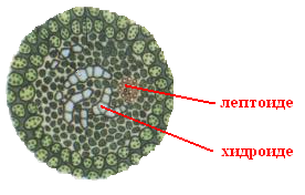 Description: Poprečni presek stabla pravih mahovina sa označenim provodnim elementima Source: self-made